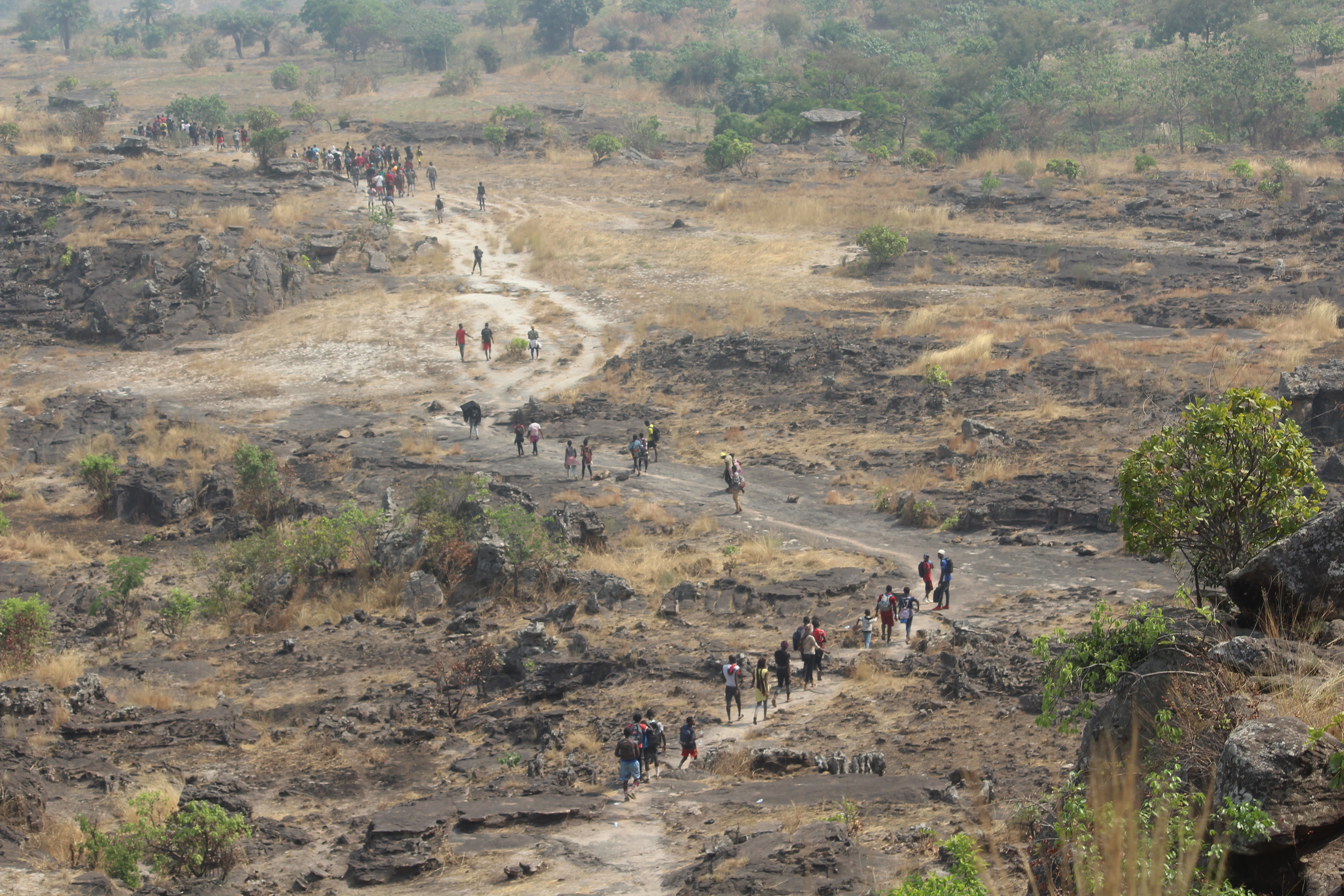 Chémin du Mont Gangan à Kindia This is an image with the theme "Africa on the Move or Transport" from: Guinea